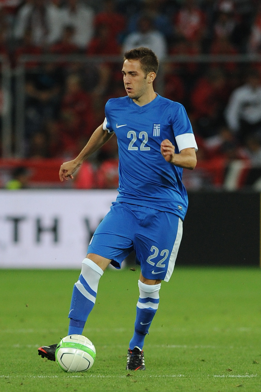 Freundschaftliches Länderspiel Österreich - Griechenland am 14. August 2013 in Salzburg: Kostas Fortounis